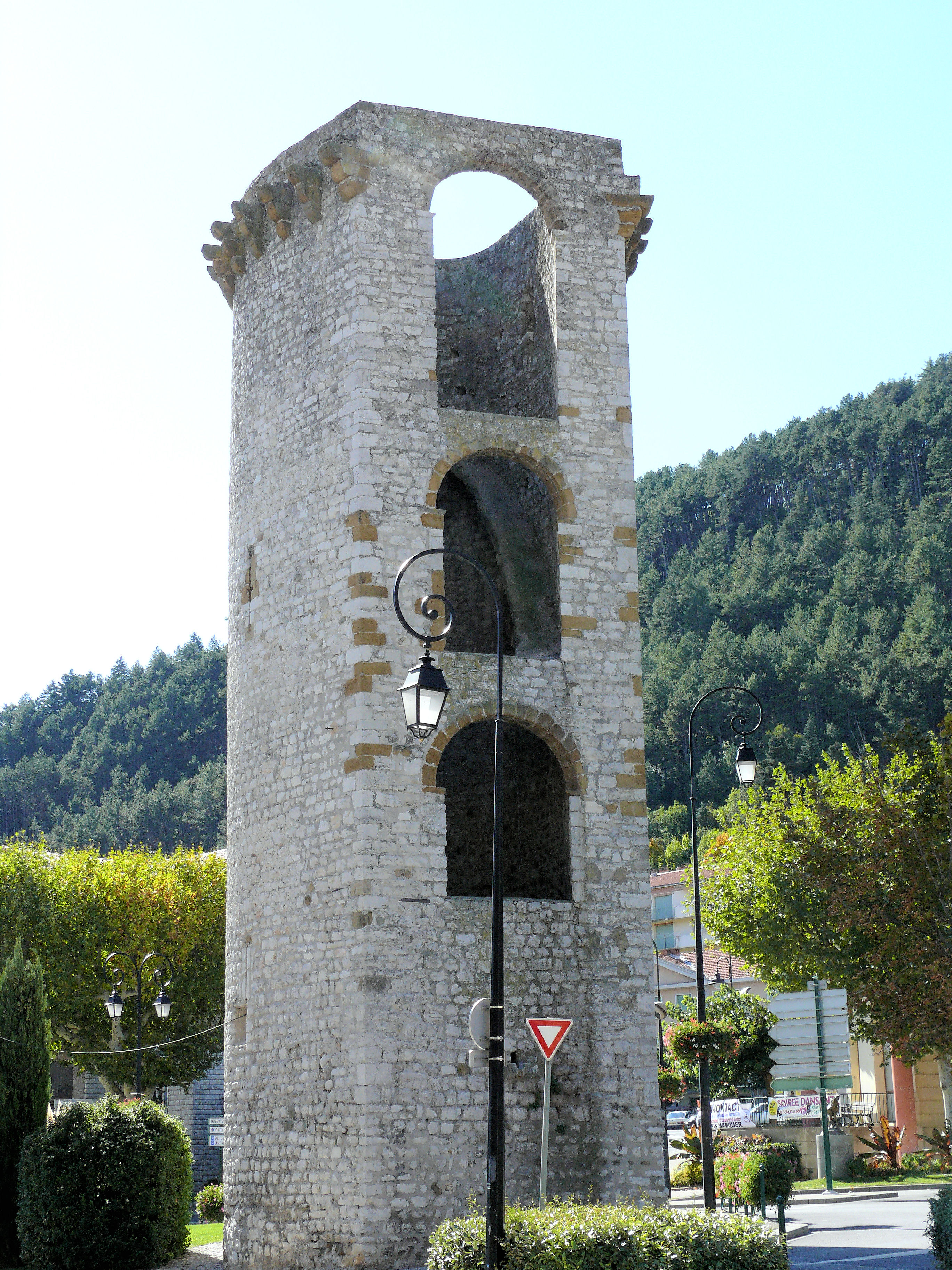 Sisteron - Enceinte - Tour de la Médisance